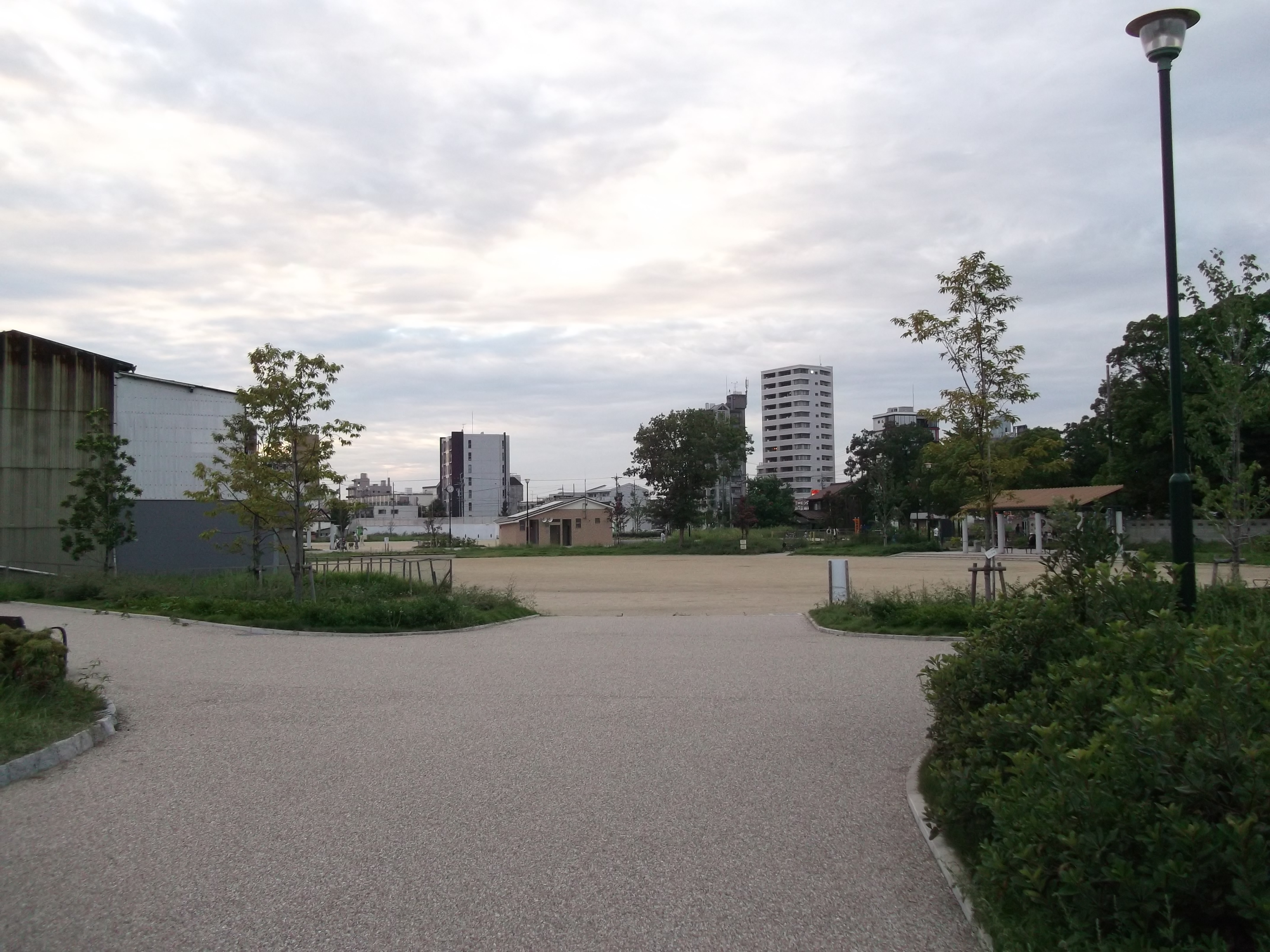 名古屋市中村区の米野公園を南東角から北西方面を撮影。